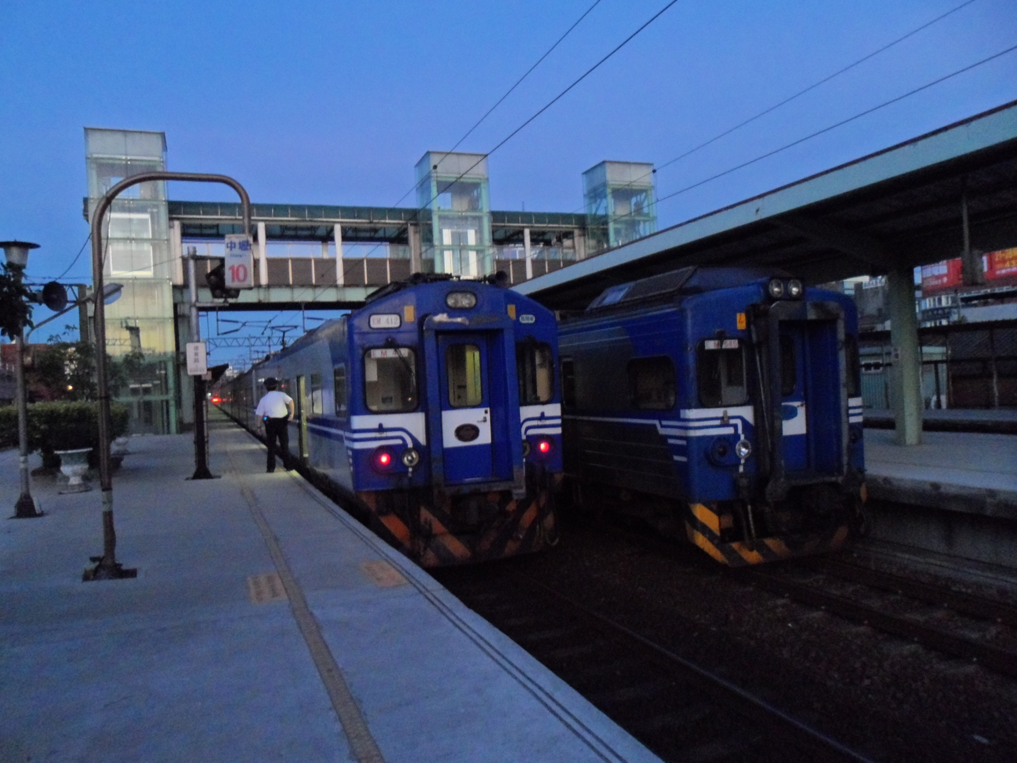 臺灣鐵路管理局中壢車站月台區。左邊停靠第三月台的EMU400列車為2013年11月9日的1101次首班區間車，右邊停靠第二月台的EMU500列車為往蘇澳的區間車。